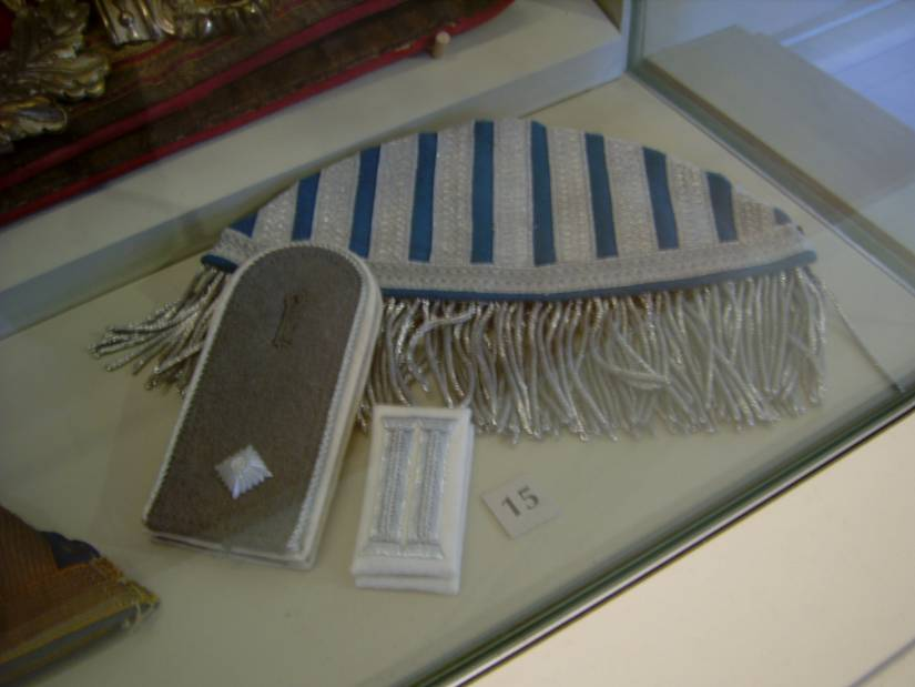 Militärmusik: Schwalbennest der NVA, Kragenspiegel der Bundeswehr